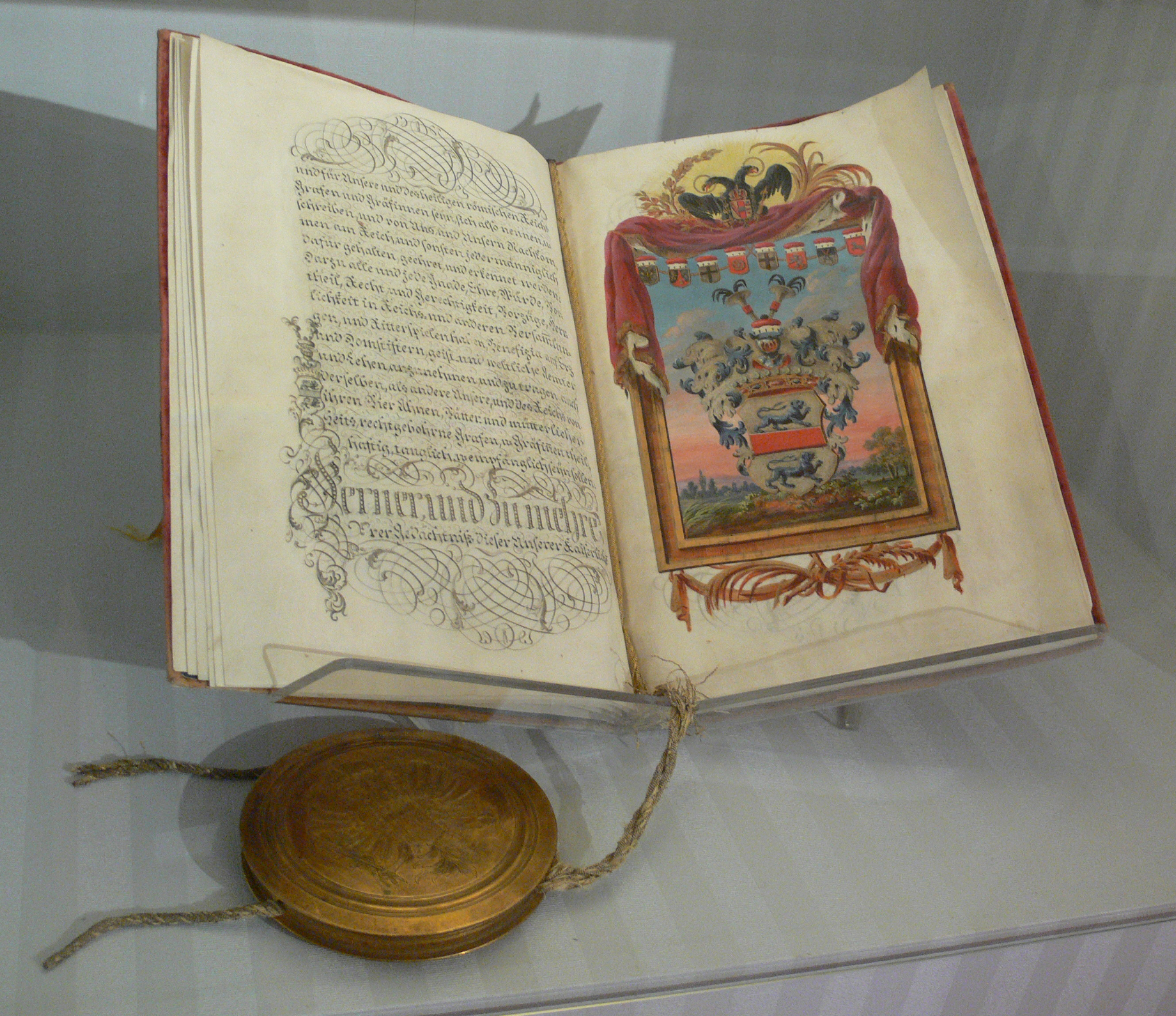 Erhebung des Freiherrn Anton Schenk von Stauffenberg (1734–1803) in den Reichsgrafenstand durch Kaiser Leopold II., 1785 (dies betraf nur die inzwischen ausgestorbene Wilflinger Linie der Familie)